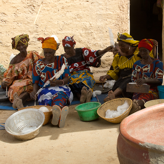 Fileuses de coton dans la région d'Oury This is an image of Cultural Fashion or Adornment from Burkina Faso